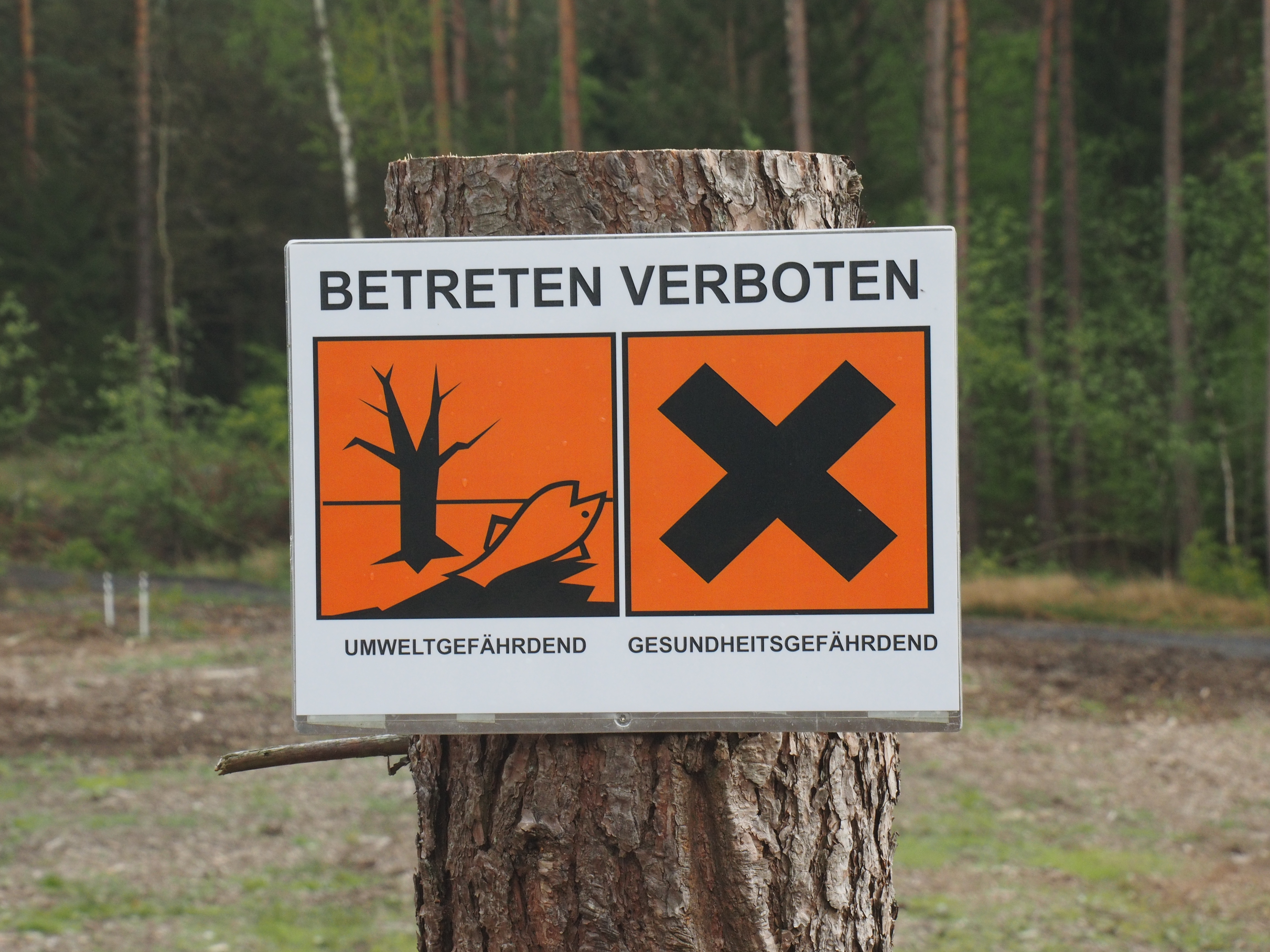 Warnschild im Außenbereich des Dethlinger Teiches